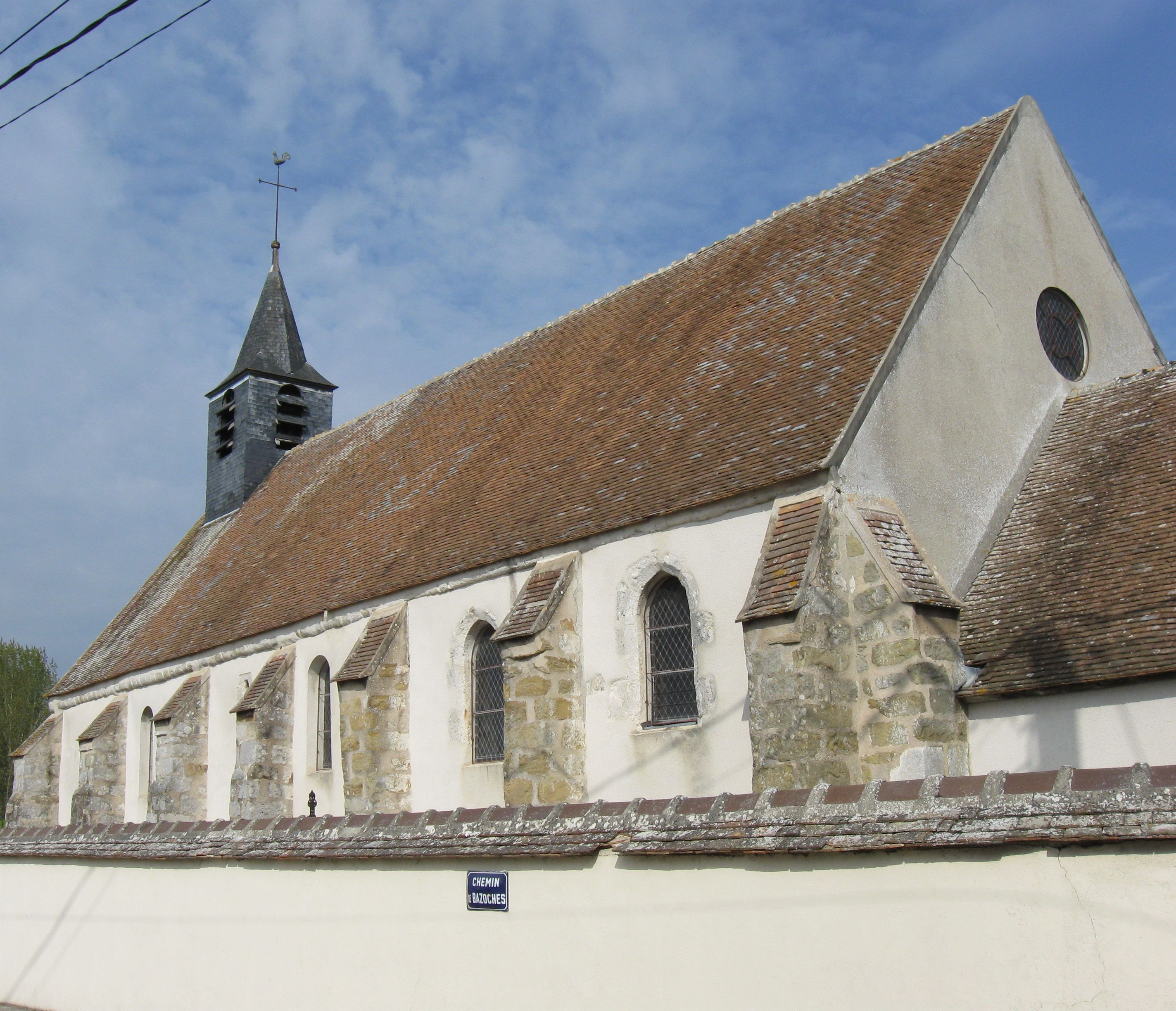 Église Saint-Maur de Mousseaux-lès-Bray. (Seine-et-Marne, région Île-de-France).